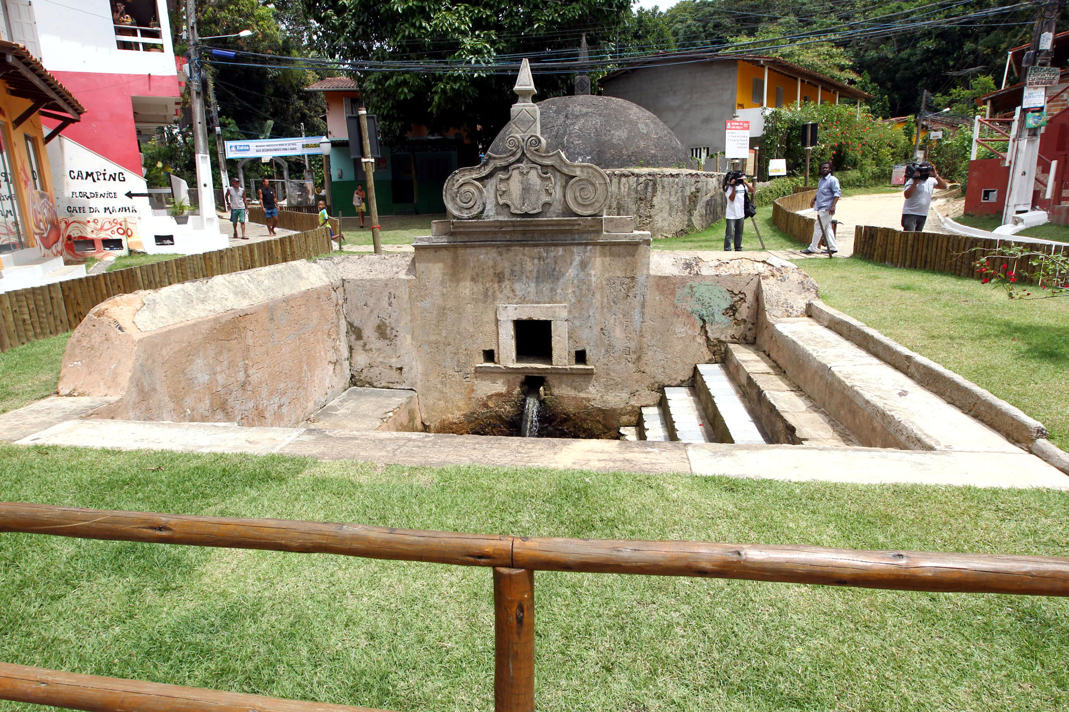 Governador Jaques Wagner inaugura obras de requalificação urbana em Morro de São Paulo. Foto: Manu Dias/SECOM